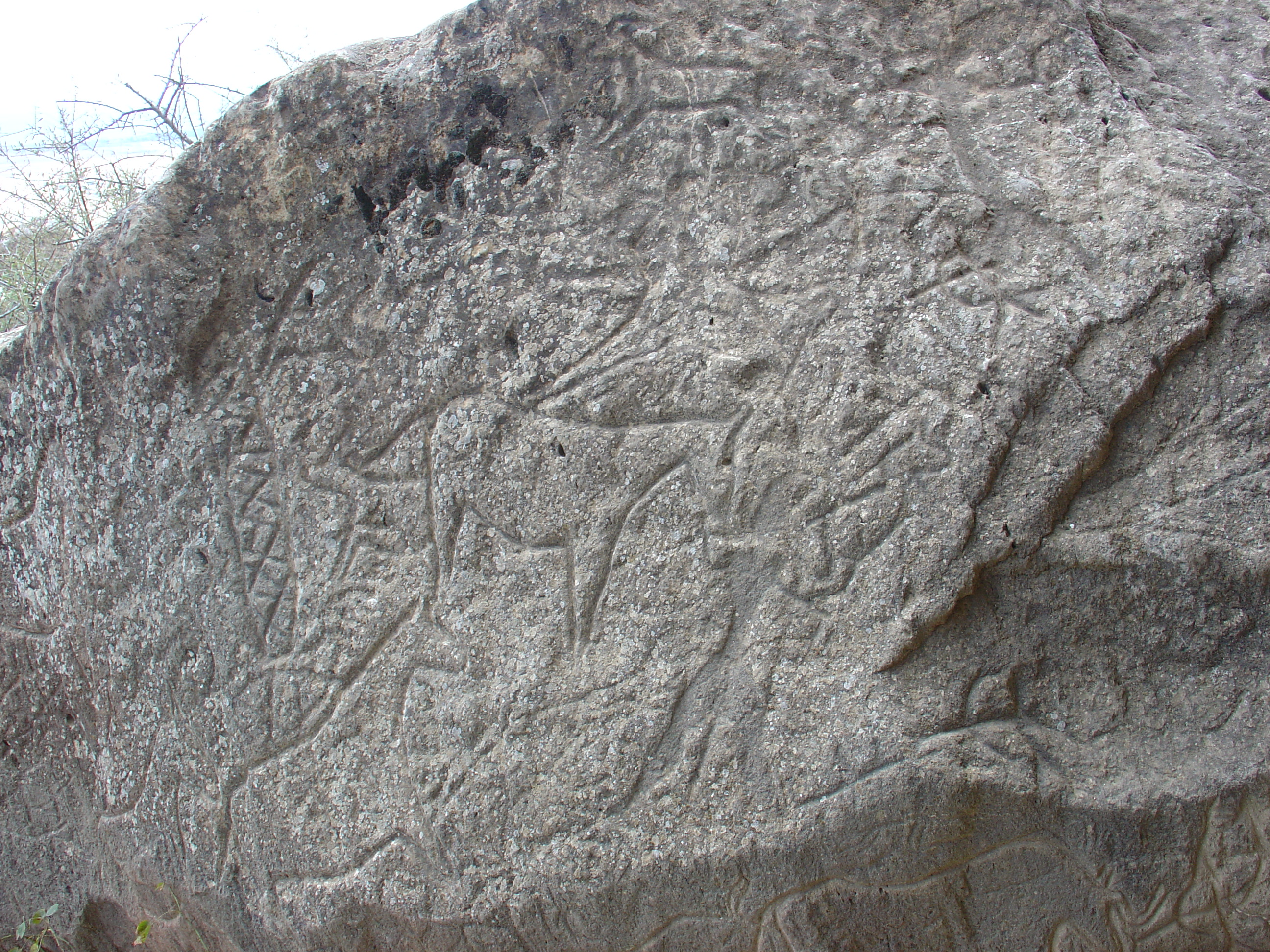 Petroglyphs near Qobustan, Azerbaijan